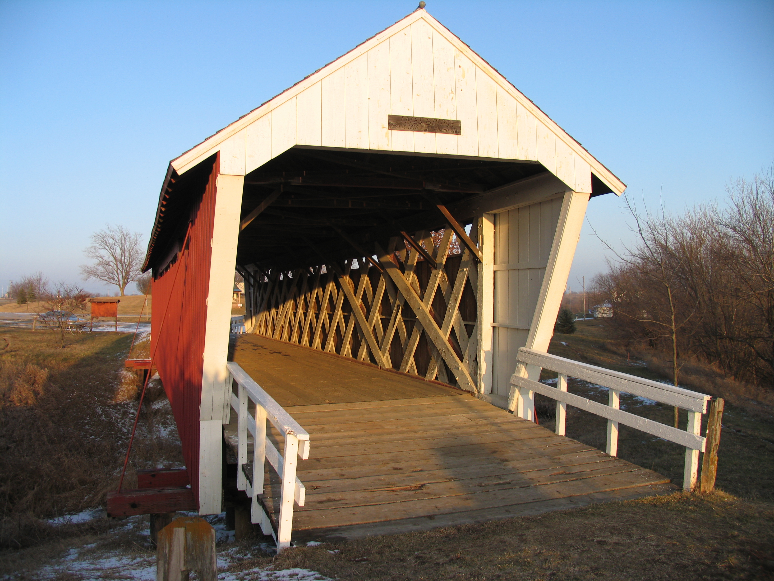 Ponte Coberta - Imes Bridge Madison County - Iowa Luiz F Castro 16:43, 23 Janeiro 2006